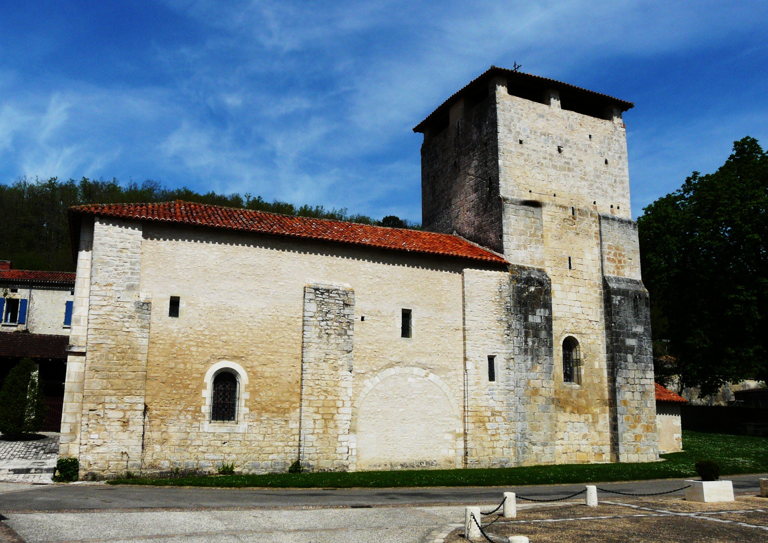 L'église Saint-Pierre et Saint-Paul, Bussac, Dordogne, France